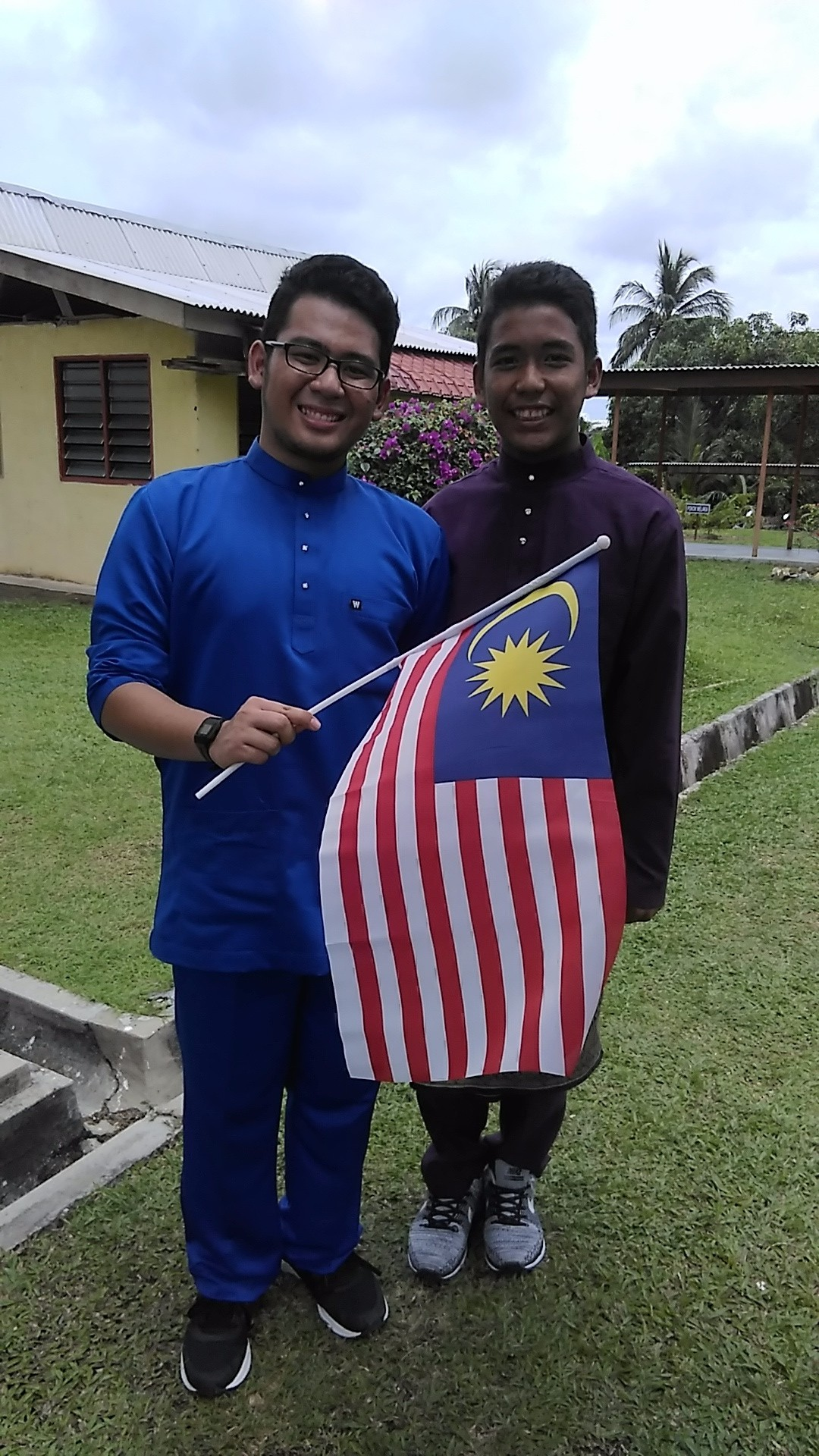 Kami Anak Malaysia